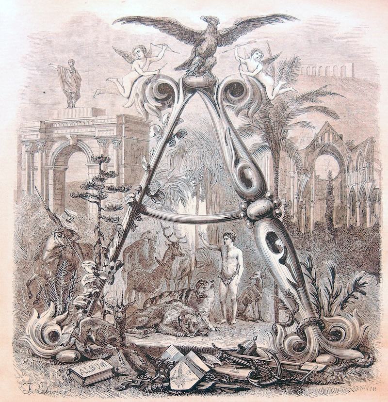 Grand Dictionnaire universel du XIXe siècle, de Pierre Larousse (1866). Dessin illustrant la page de la lettre A.